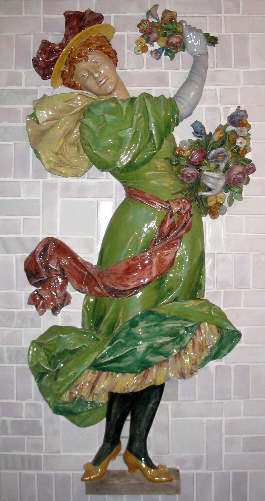 Panneau de faïence émaillée par Jules-Paul Loebnitz (Paris 1836 - Paris 1895), Les Fleurs (1894), d'après un dessin de Jules Blanchard. Musée de la Céramique de Rouen, France.